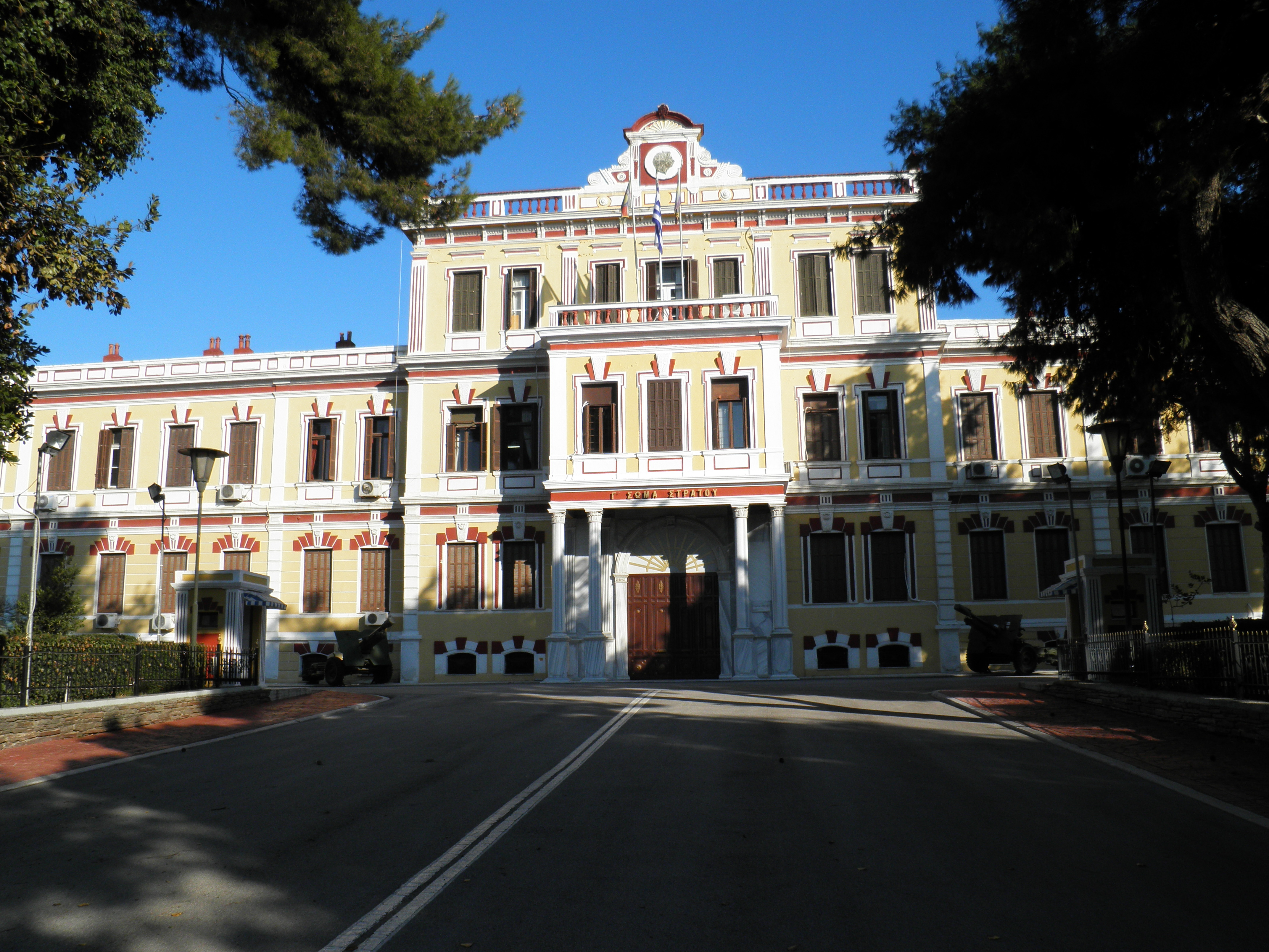 Vojni muzej